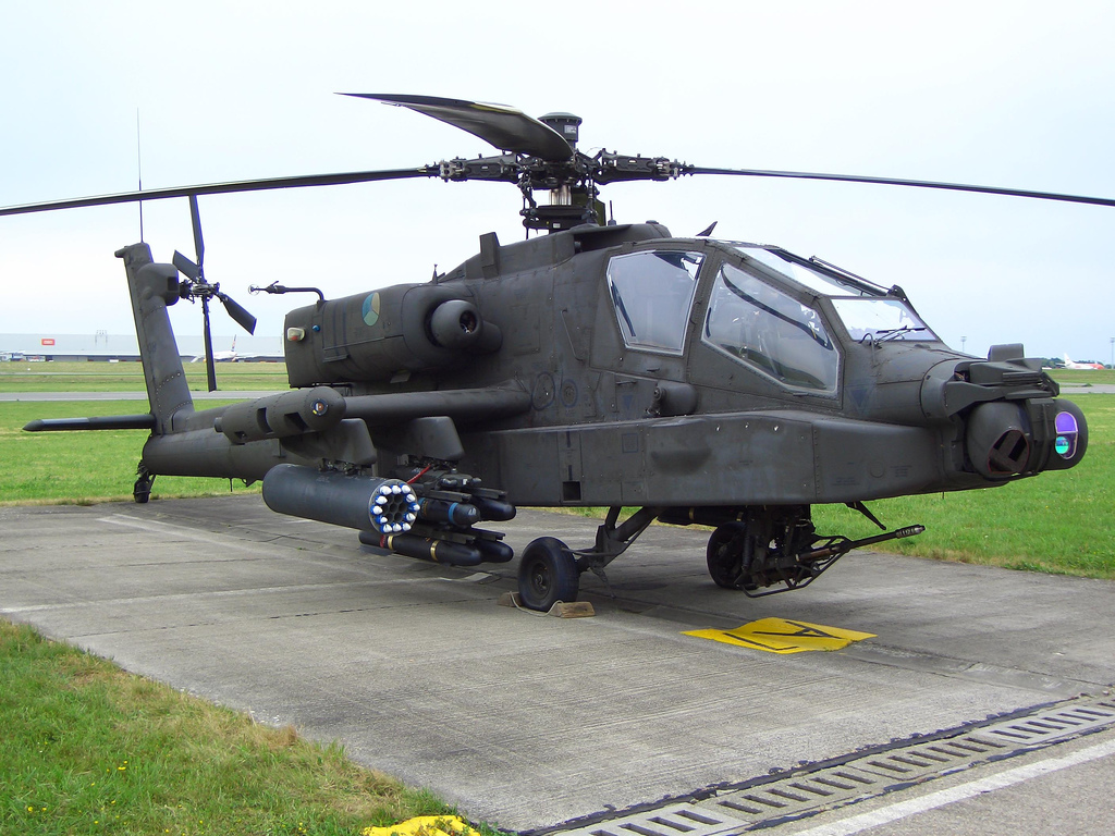 Ein vollbewaffneter niederländischer AH-64 Apache Kampfhubschrauber.